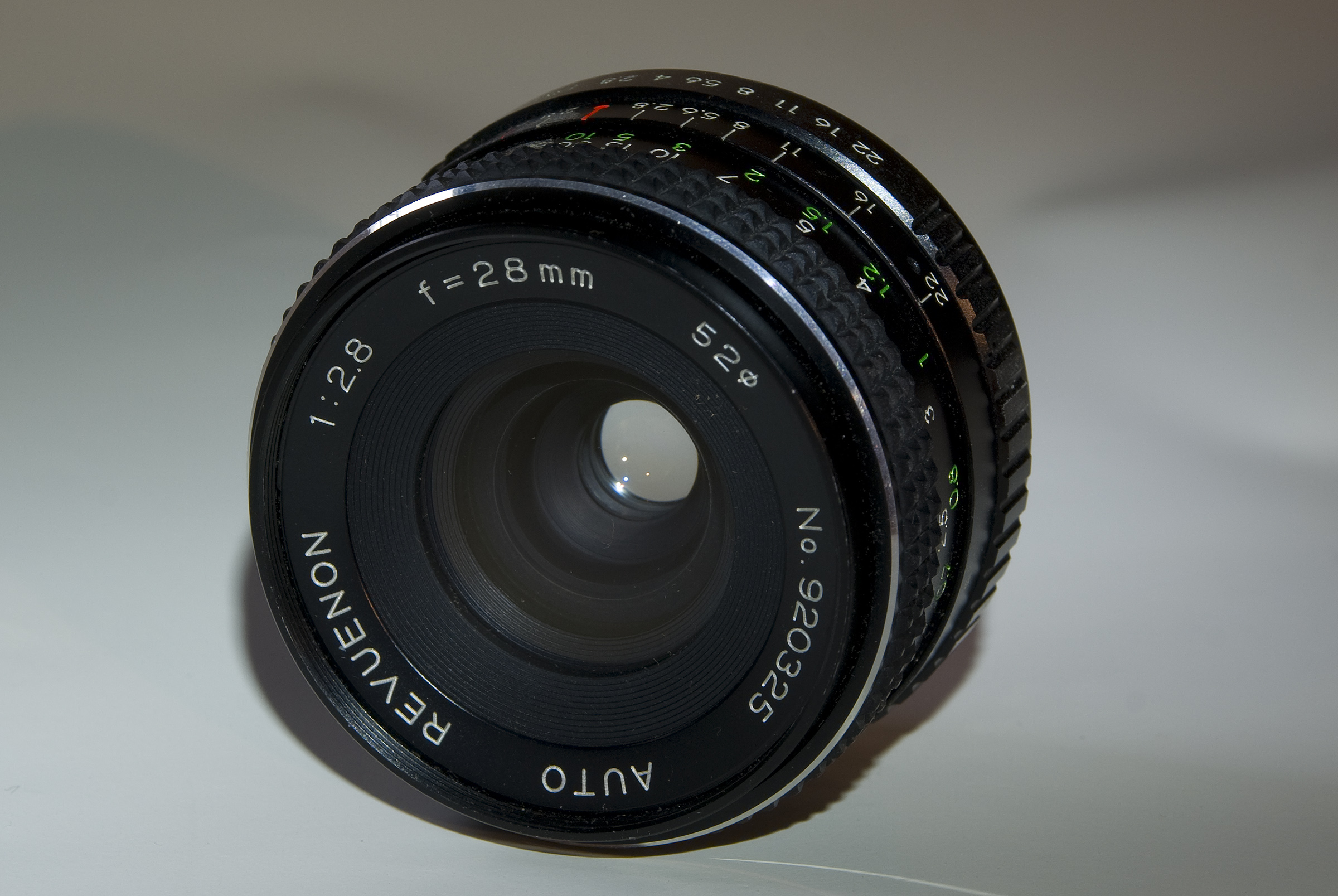 Objektiv "Revuenon", Herstellerfirma ist "Enna Werk". 1:2,8 ; Brennweite 28mm. MF für Pentax Kameras.